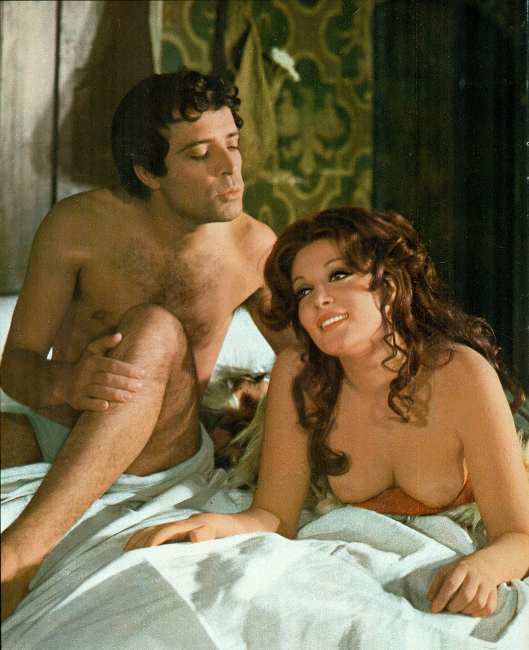 Gli attori Enrico Montesano (a sinistra) e Isabella Biagini (a destra) in uno scatto di scena sul set del film Boccaccio (1972) di Bruno Corbucci.